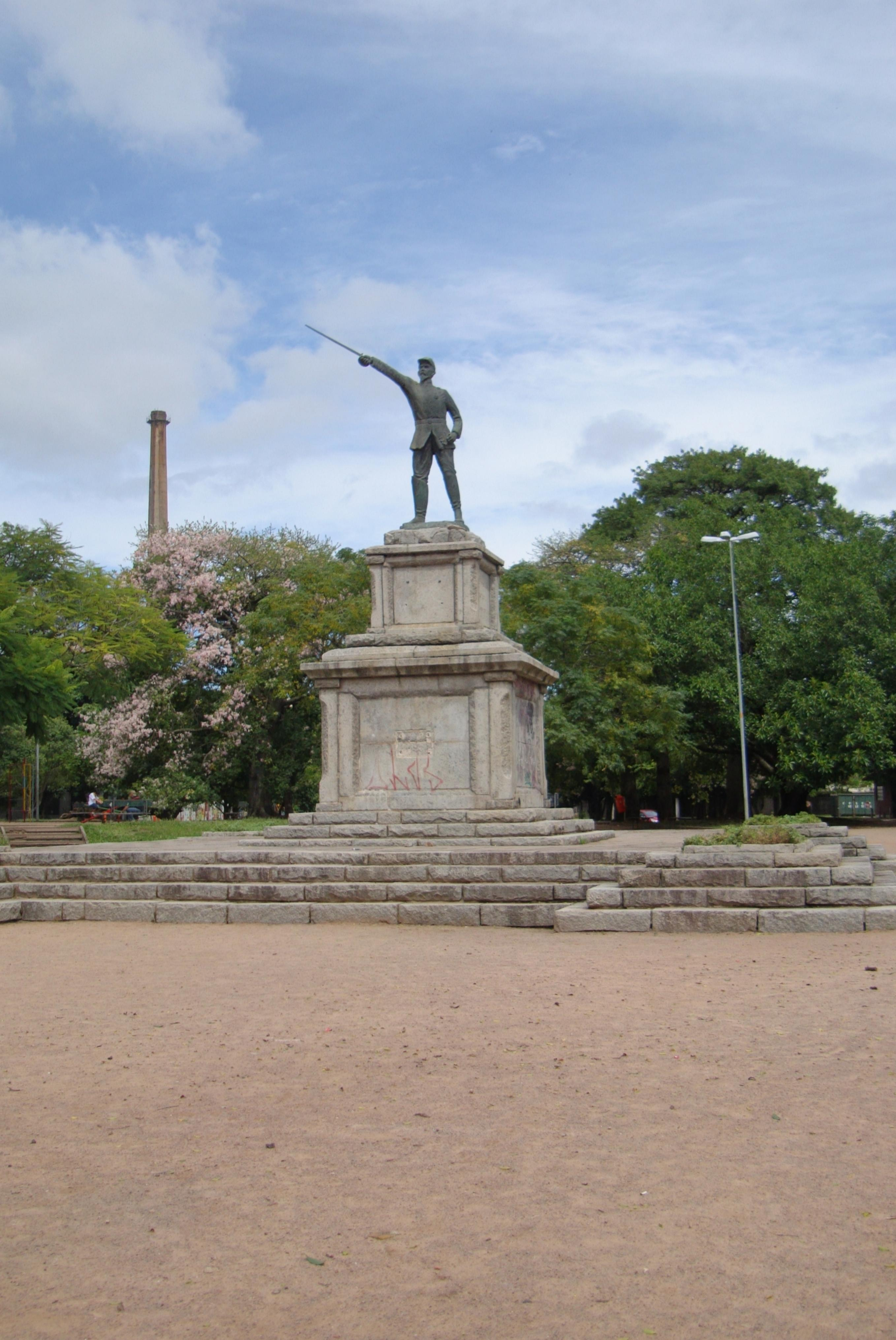 Praça Brigadeiro Sampaio em Porto Alegre.